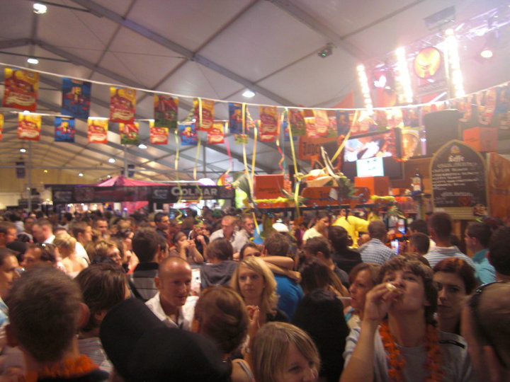 Ambiance à la Foire aux Vins d'Alsace